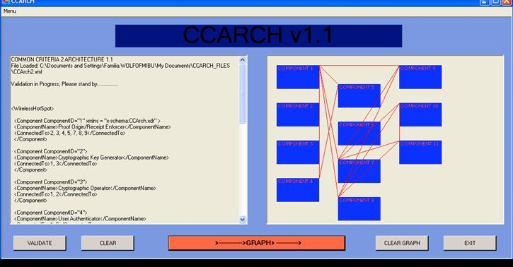 copie ecran ccarch